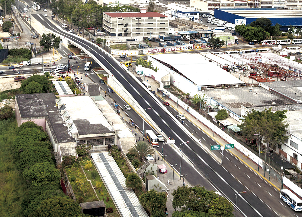 ELEVADO LA YAGUARA